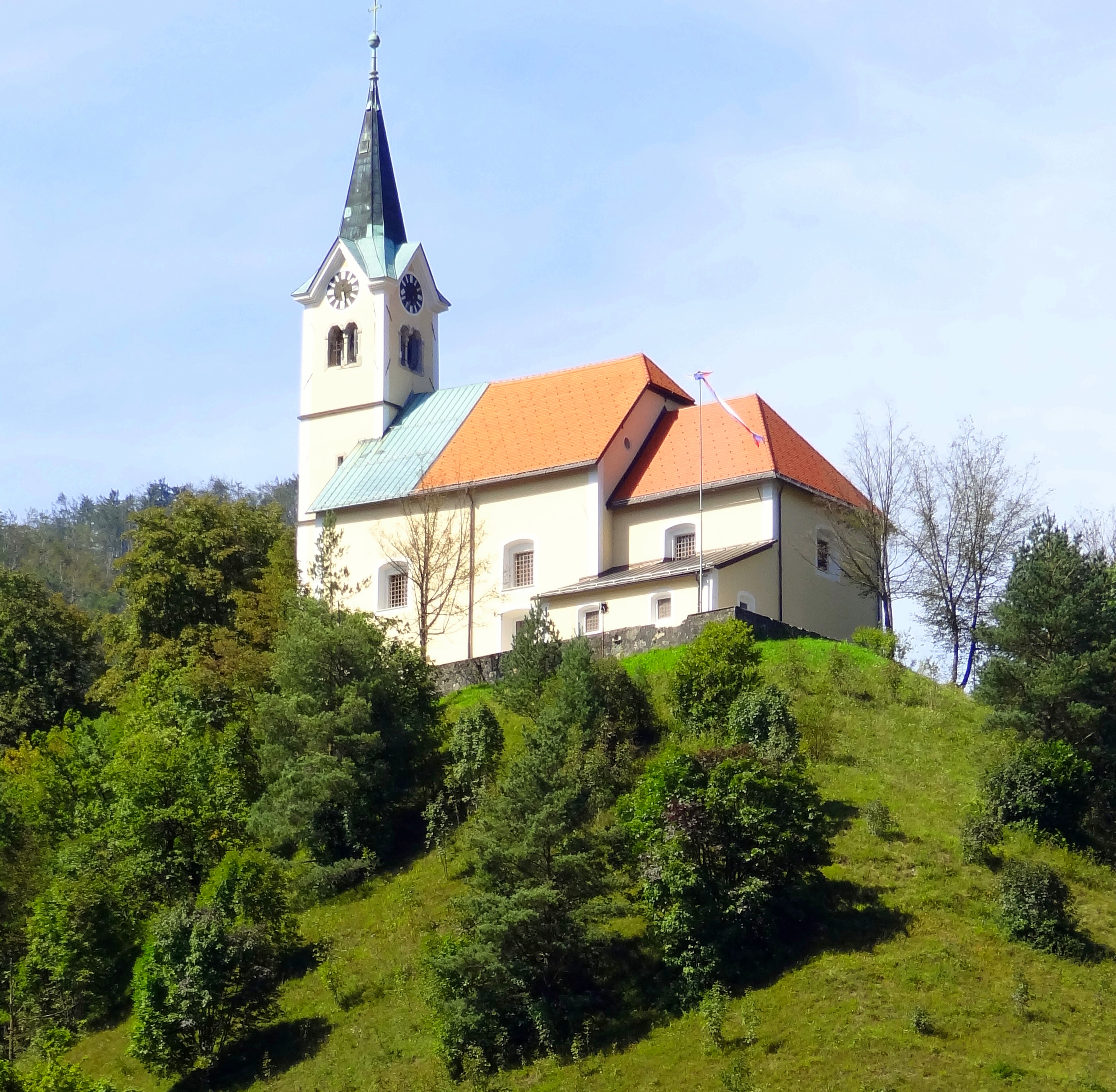 20140829 Idrija church